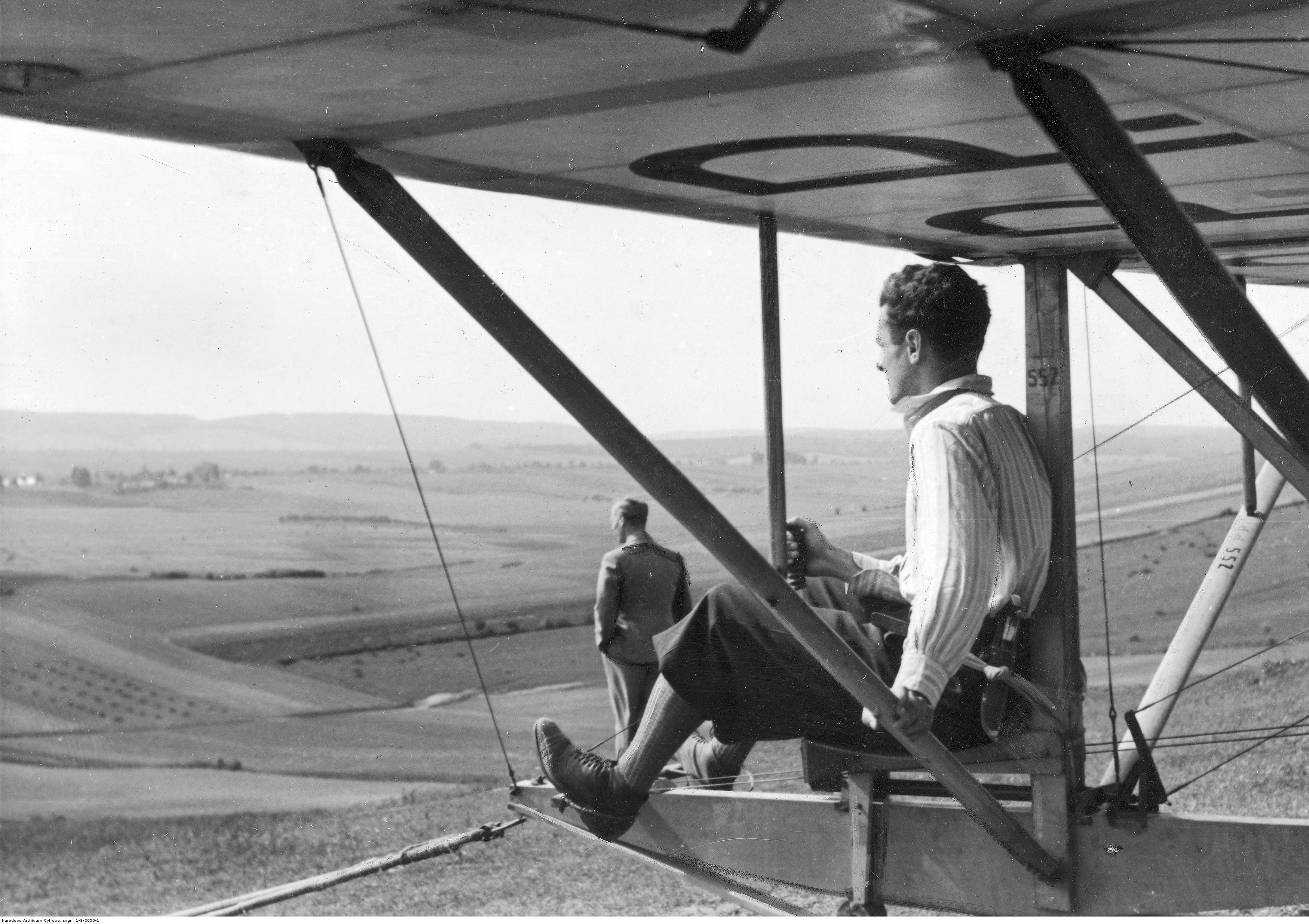 Do startu na szybowcu "Wrona" przygotowuje się jeden z zawodników.